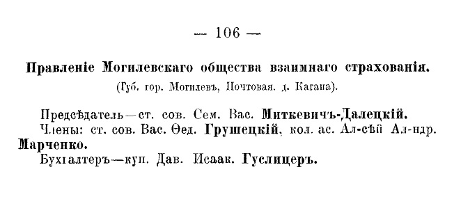 Упоминание о статском советнике В. Ф. Грушецком. Адрес-календарь "Памятная книжка Могилёвской губернии на 1907 год".